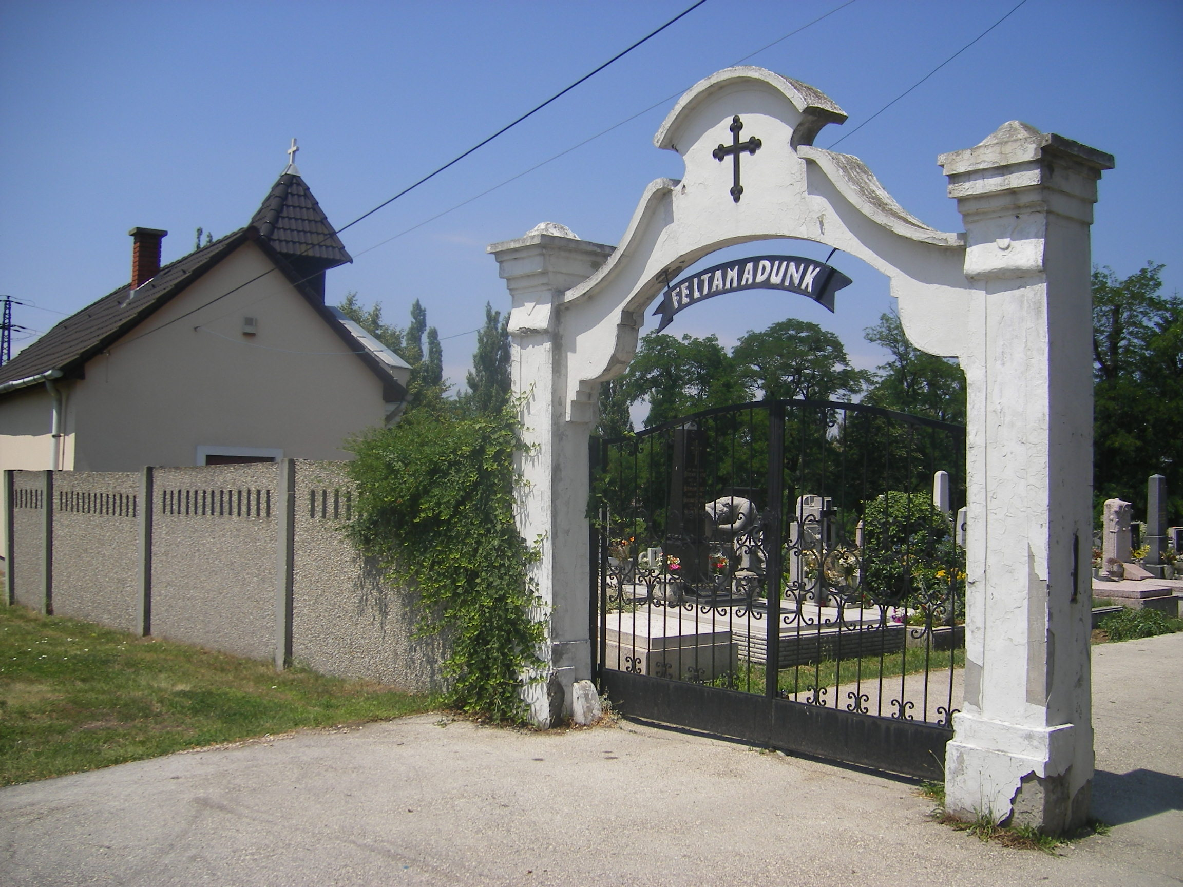 Felsőgalla - Temetőkapu